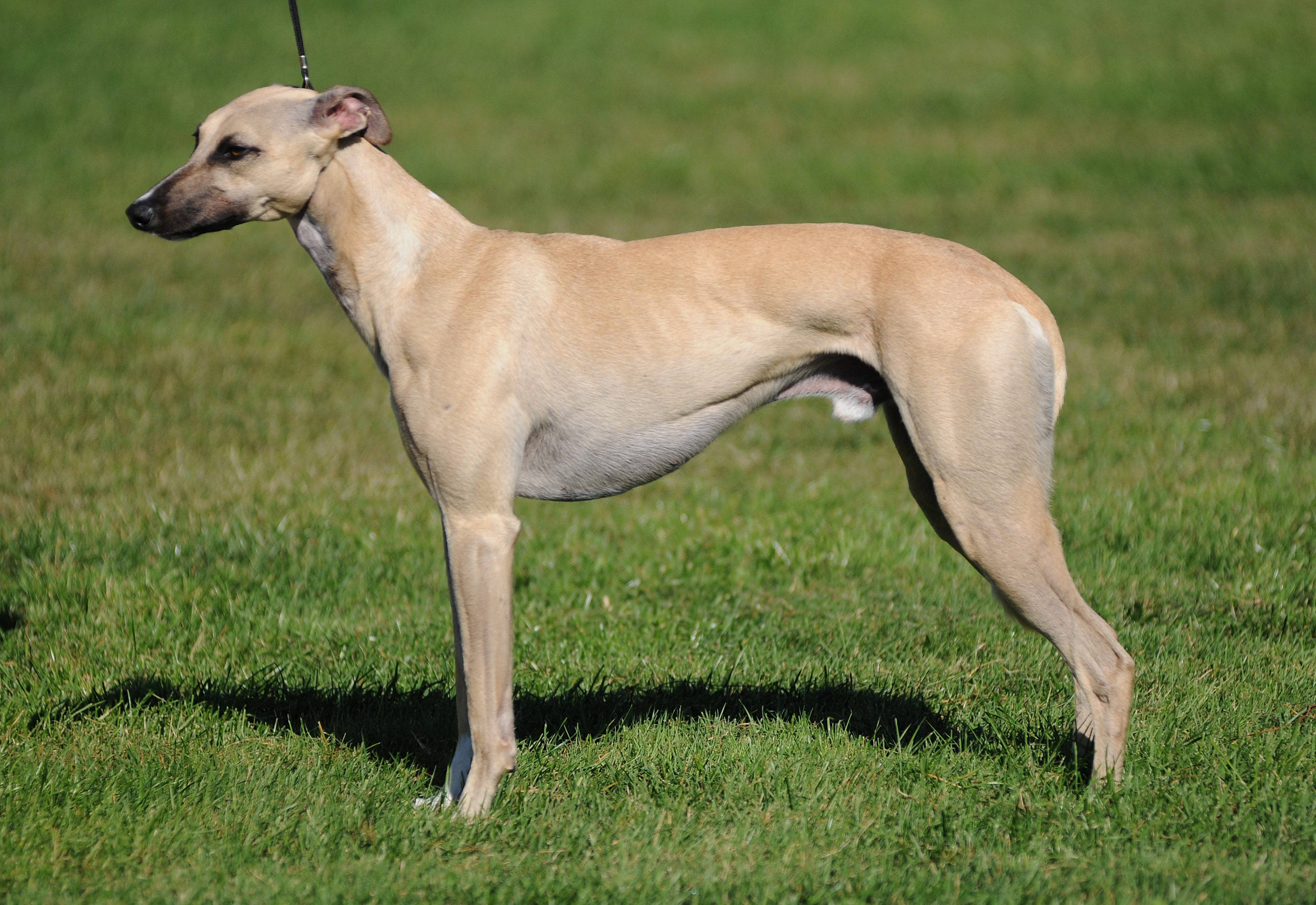 Anakin (Whippet)